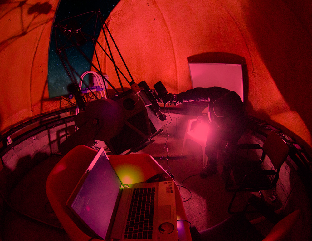 Desde el Observatorio Astronómico Los Molinos, haciendo astrofotografía.